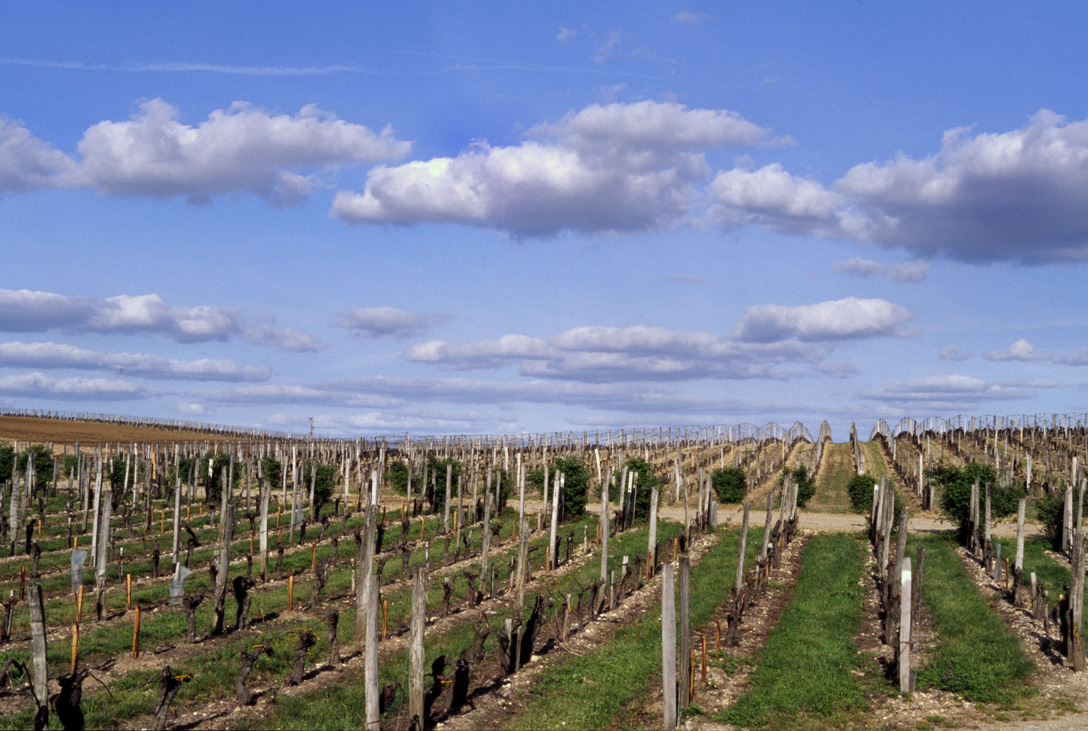 Vignes / Weinberge / Vineyards, Château Figeac, Saint-Emilion, France